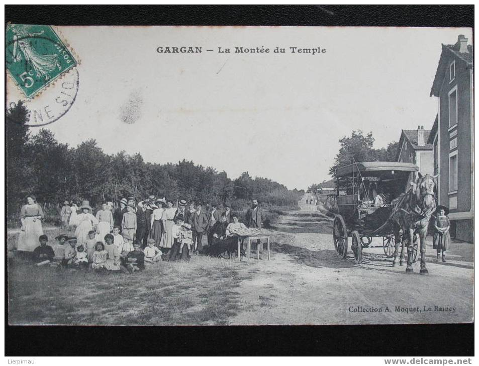 boulevard du Temple, anciennement "La montée du Temple" (usines de Xavier Gargan)